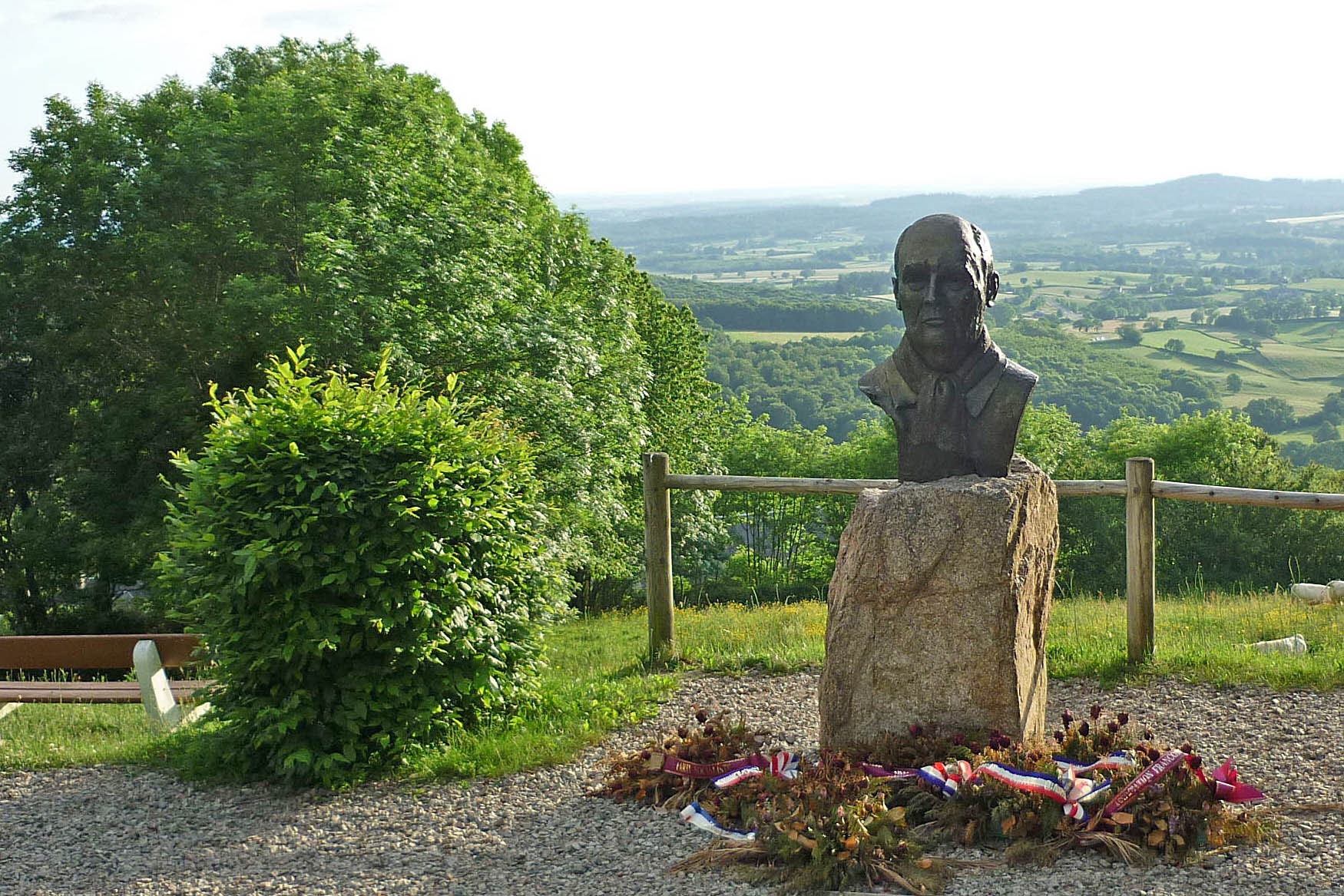 Mitterand-Denkmal in Château-Chinon